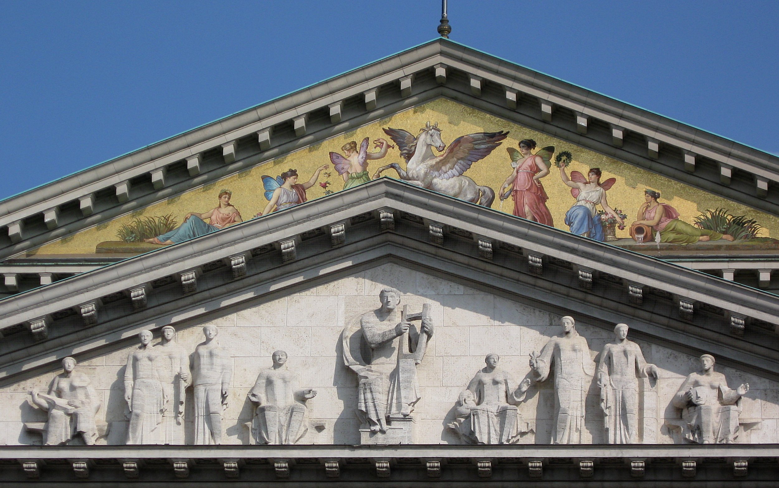 Georg Brenninger: Giebel am Nationaltheater, München